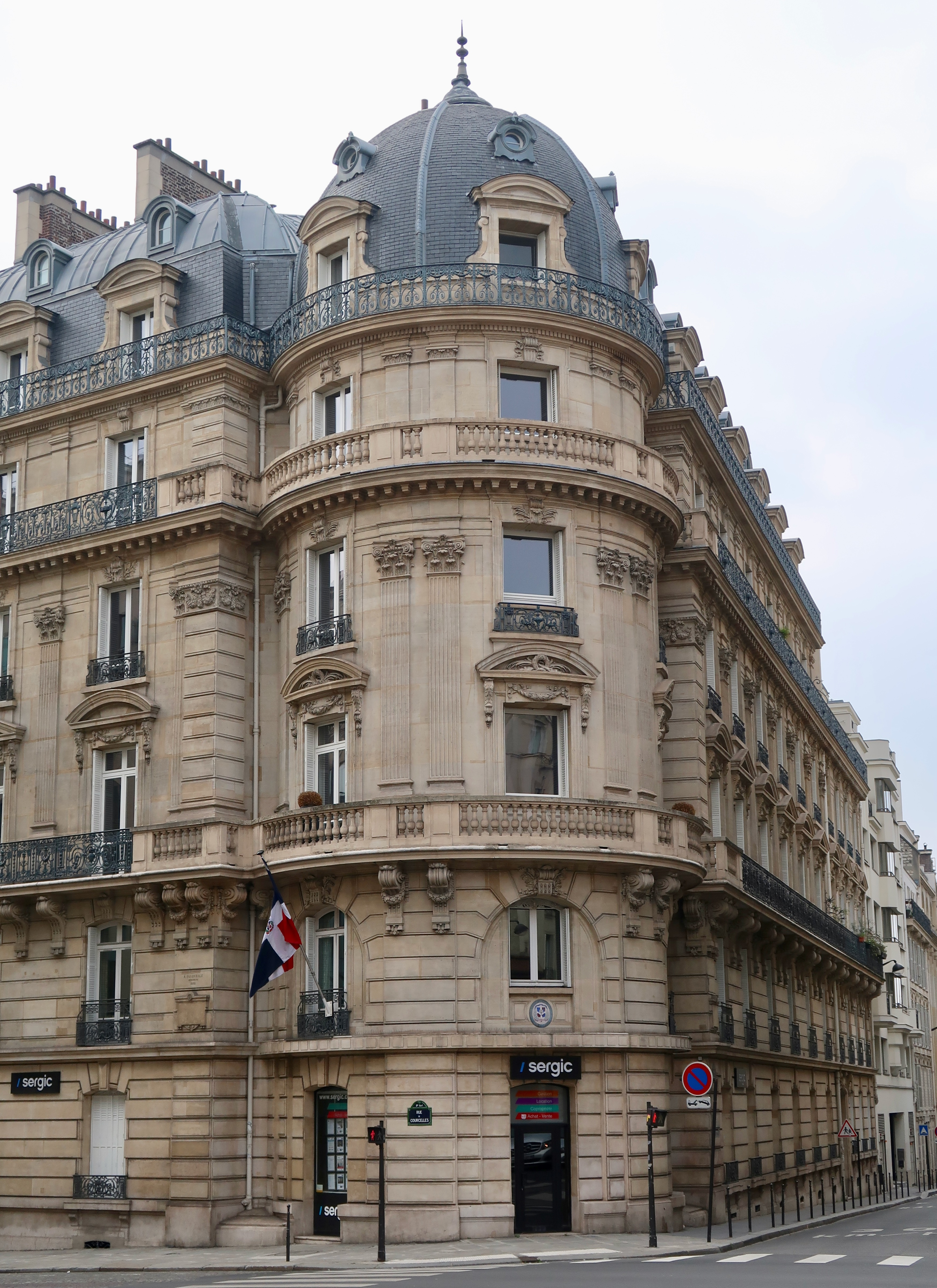 45 rue de Courcelles (Paris, 8e). Également ambassade de la République dominicaine en France.